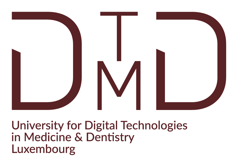 Logo der DTMD University for Digital Technologies in Medicine and Dentistry, Luxembourg